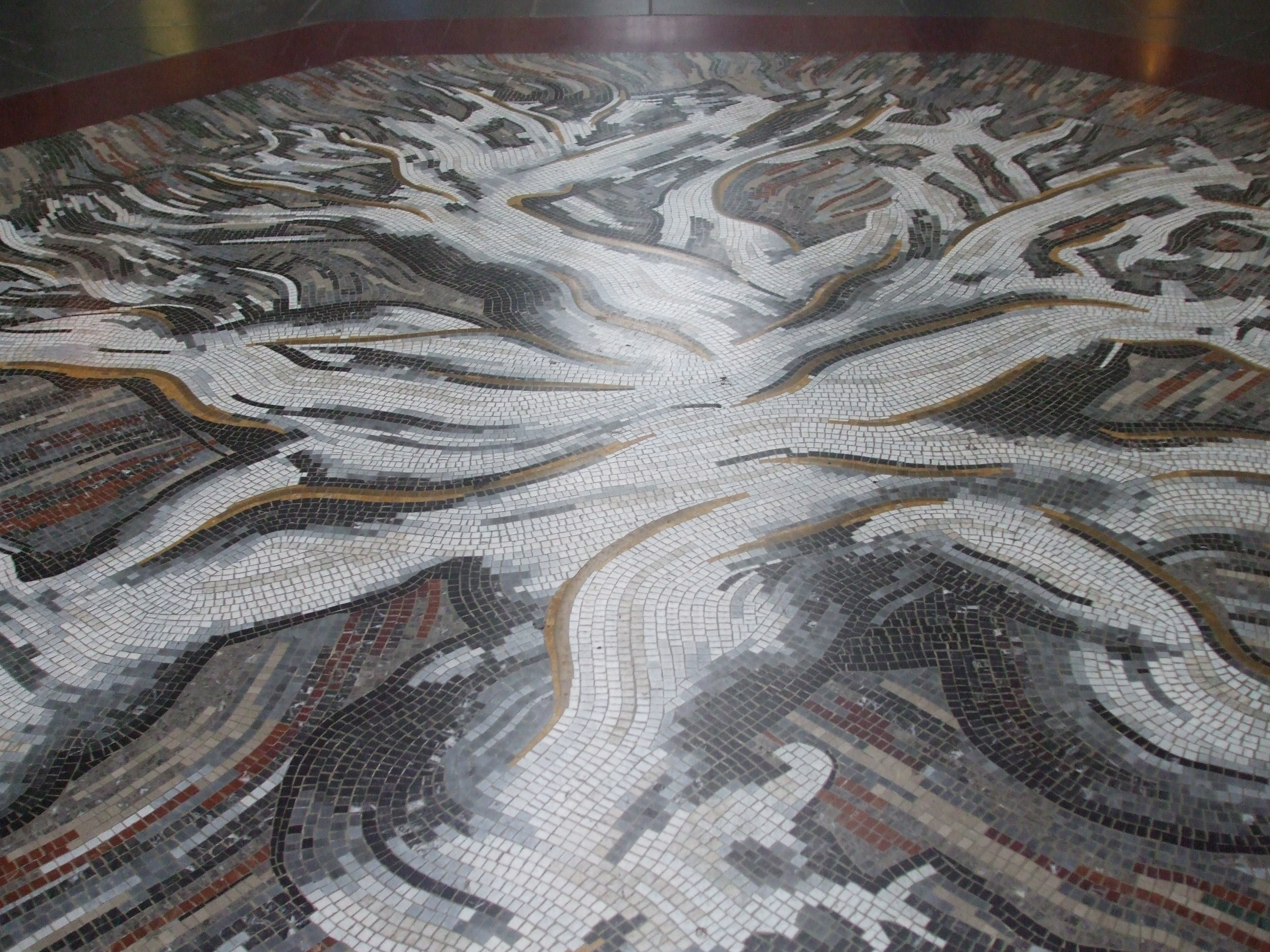 Foto al pavimento a mosaico del 2001 posto in Galleria Mazzini